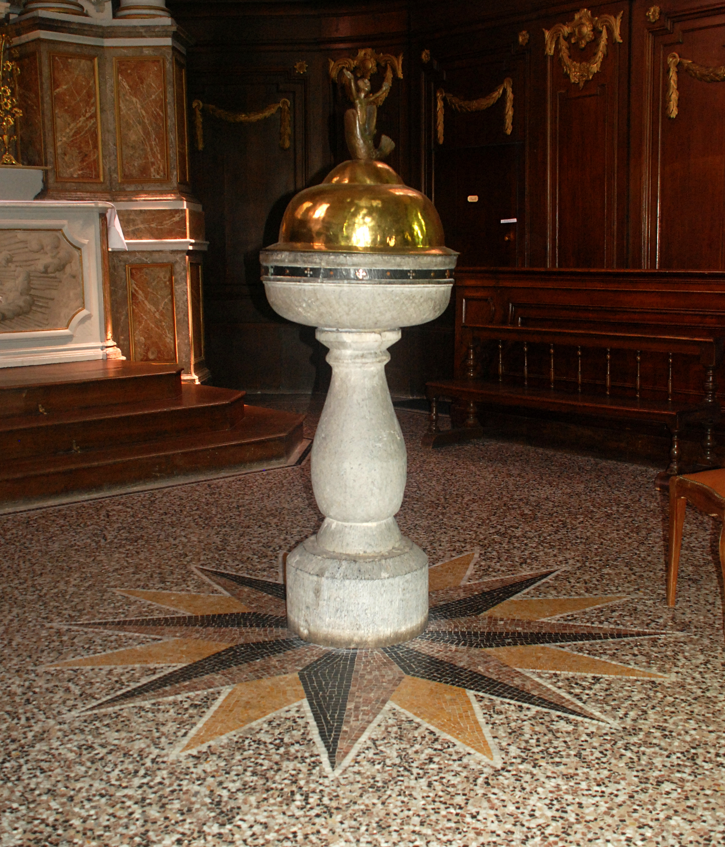 Belgique - Brabant wallon - Église de Court-Saint-Étienne